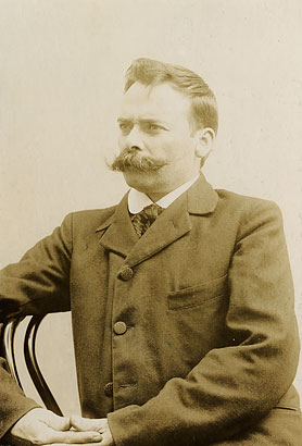 Portrait of Martín Malharro (1865-1911)